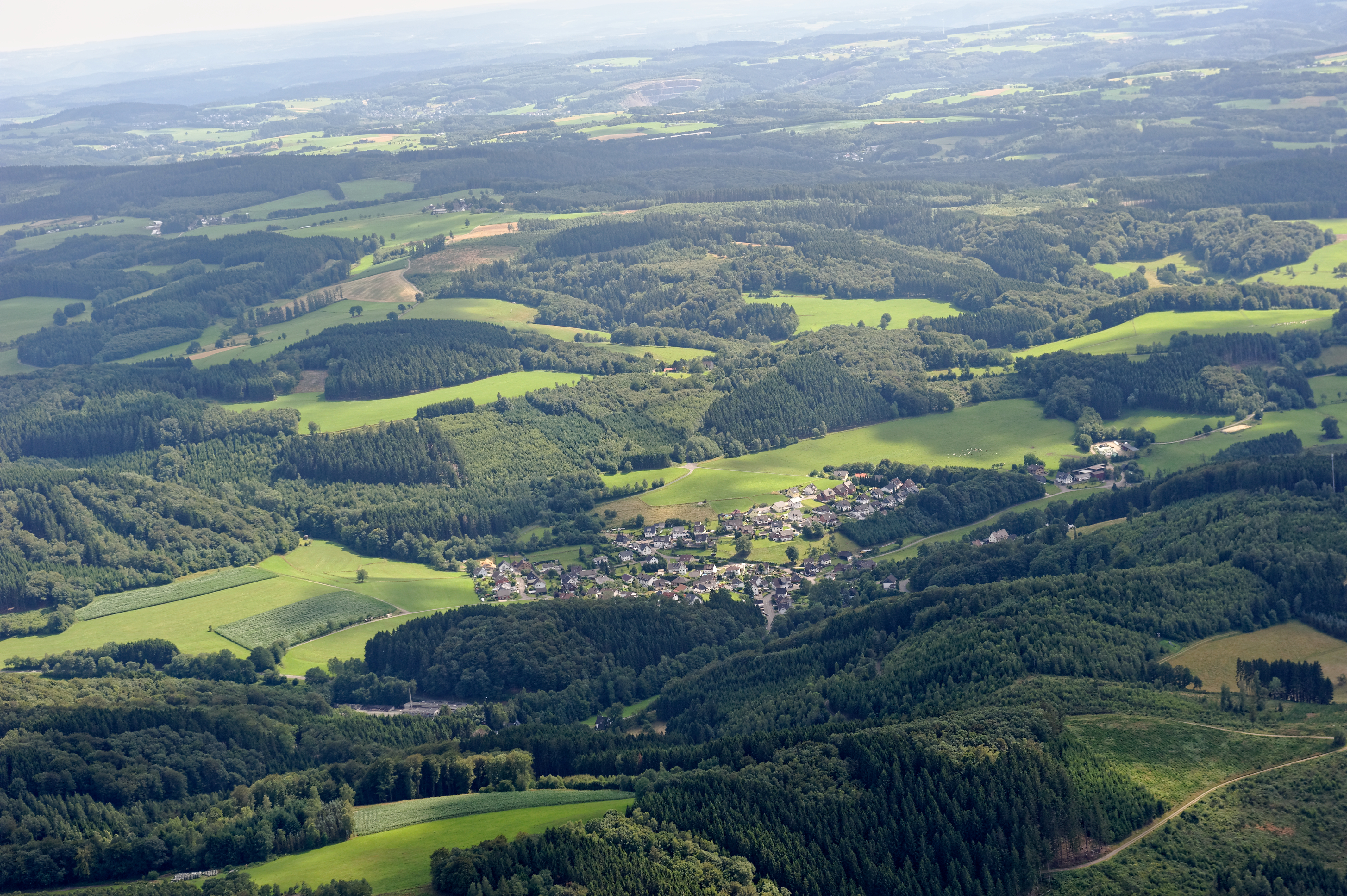 Fotoflug Sauerland West. Bergneustadt-Neuenothe, Blick Richtung Süden. The making of this document was supported by the Community-Budget of Wikimedia Germany.